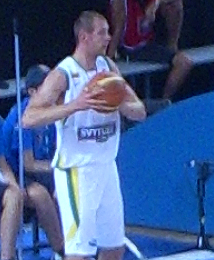 Ramūnas Šiškauskas in the Palma Arena, 2007 Eurobasket